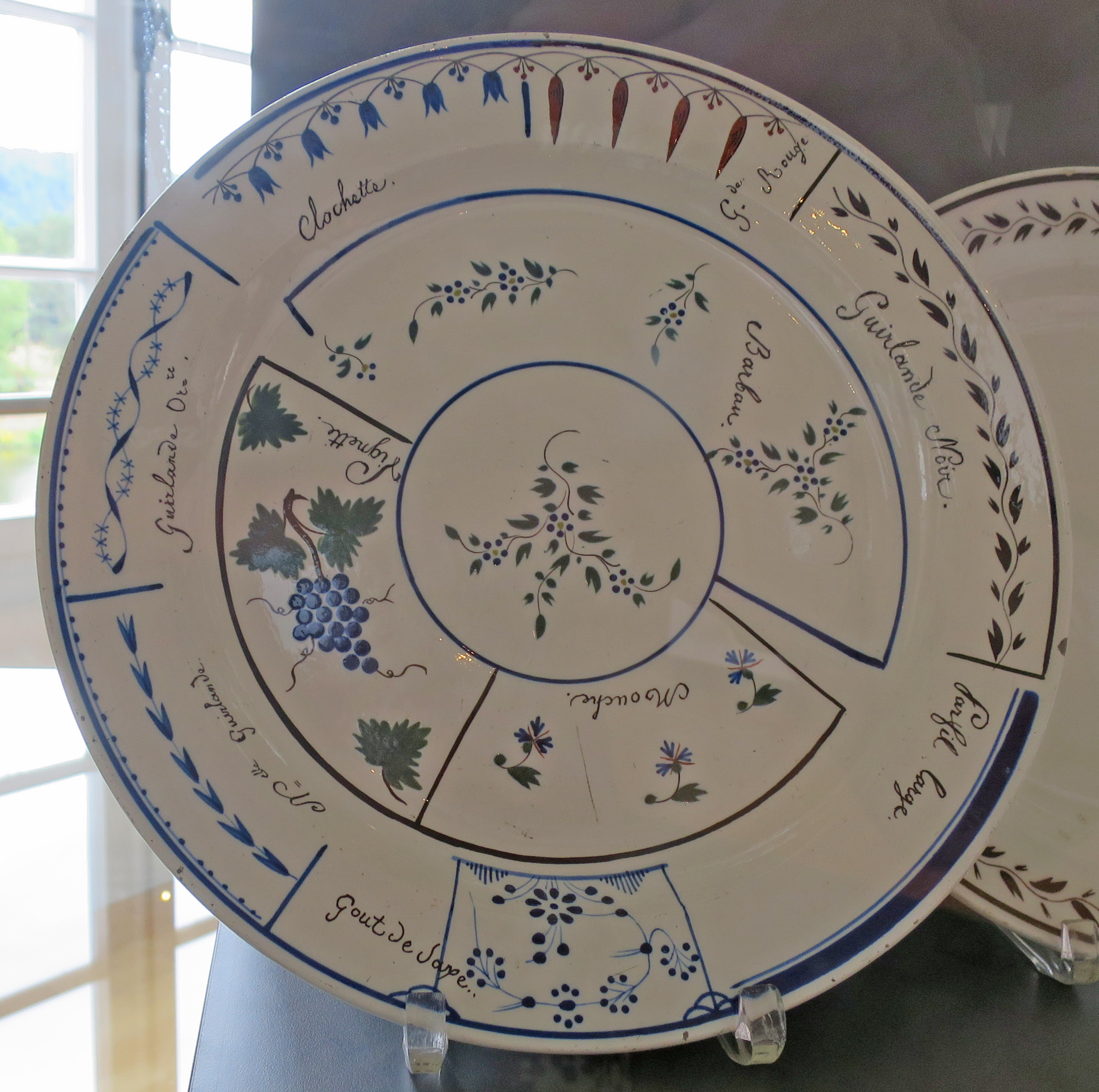 Musterteller mit verschiedenen Dekors für Vertreter von Villeroy & Boch, Keramikmuseum Mettlach